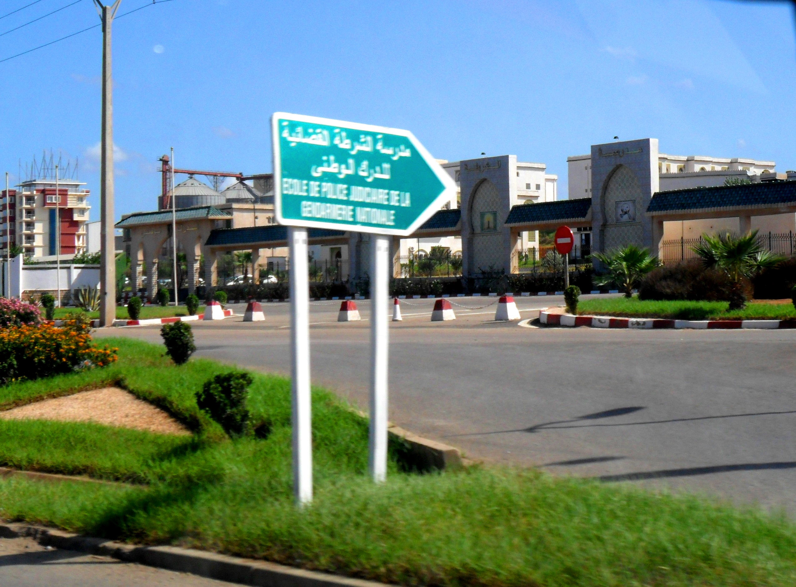 école de la PJ (GN) مدرسة الدرك